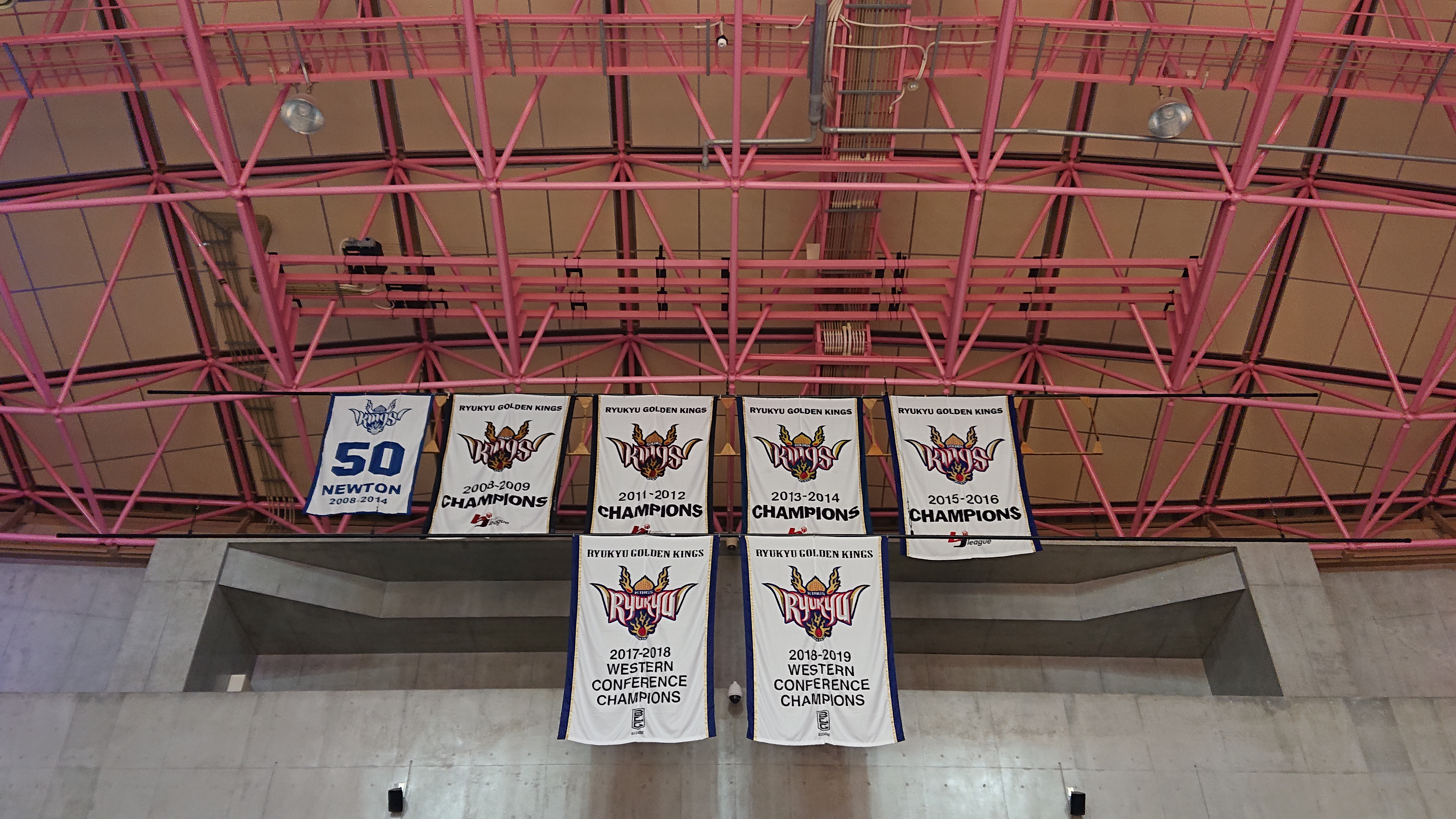 琉球ゴールデンキングスの優勝フラッグと永久欠番2